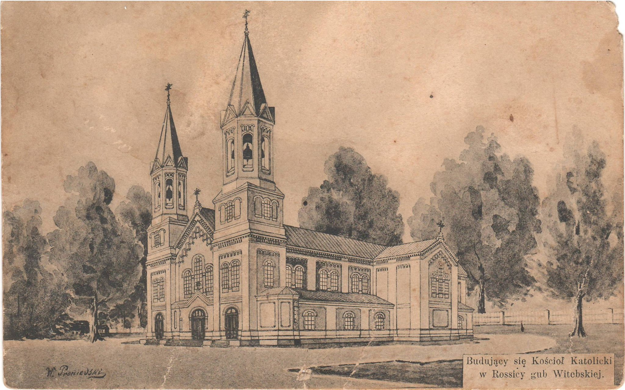 Беларуская (тарашкевіца): Росіца (Rosica). Новы касьцёл